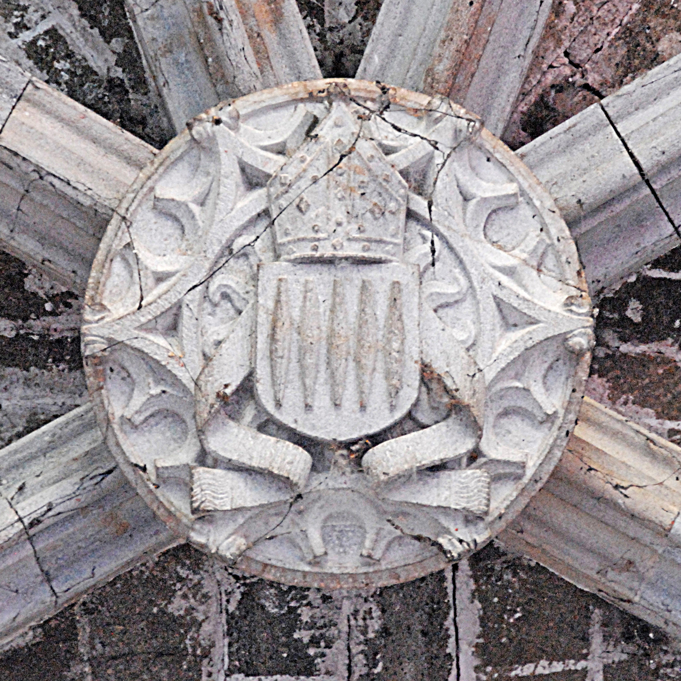 Chanteuges, Chapelle St.-Anne, Schlussstein Joch 2